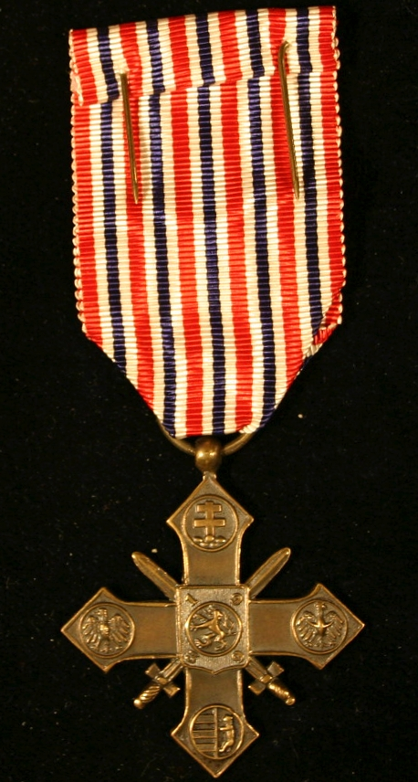 československý válečný kříž